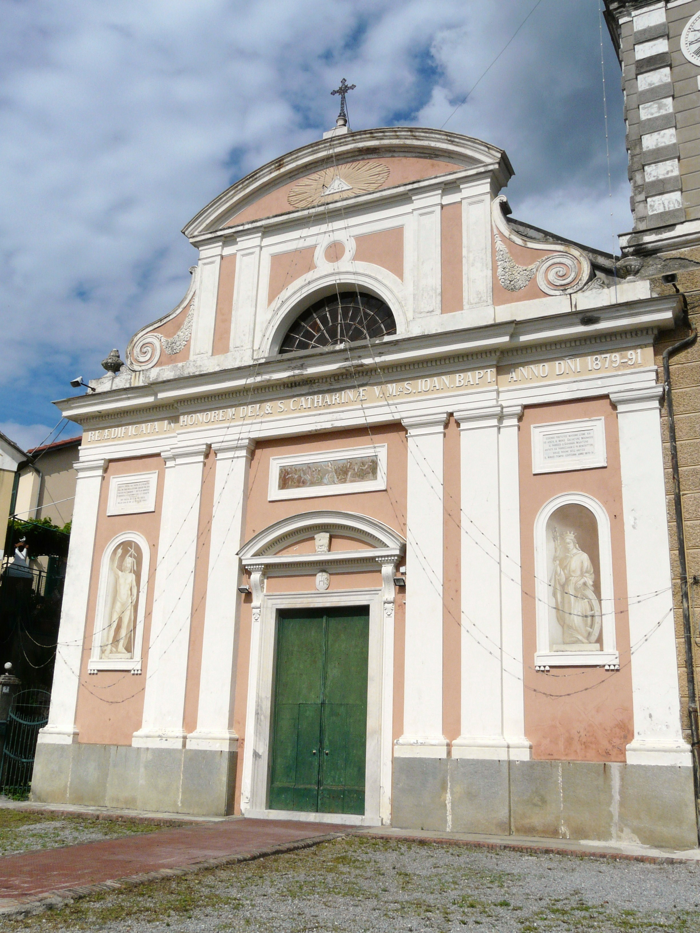 Facciata della chiesa di Santa Caterina, Begato, Genova, Liguria, Italia